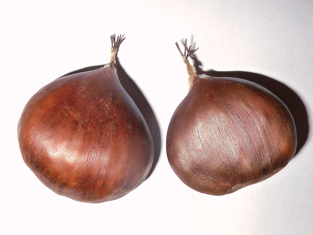 Castanea sativa cv. "Nigral" (Castaño común) : Aquenios maduros con su pistilo y sus estilos persistentes. - Origen, Villafranca del Bierzo (Provincia de León), comercio, Madrid (España).